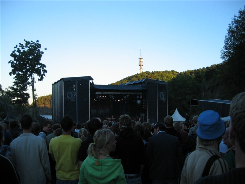 Quartfestivalen 2004, Bendiksbukta. Slipknot